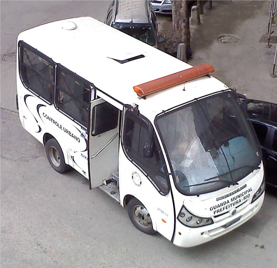 Veículo da Guarda Municipal da Cidade do Rio de Janeiro